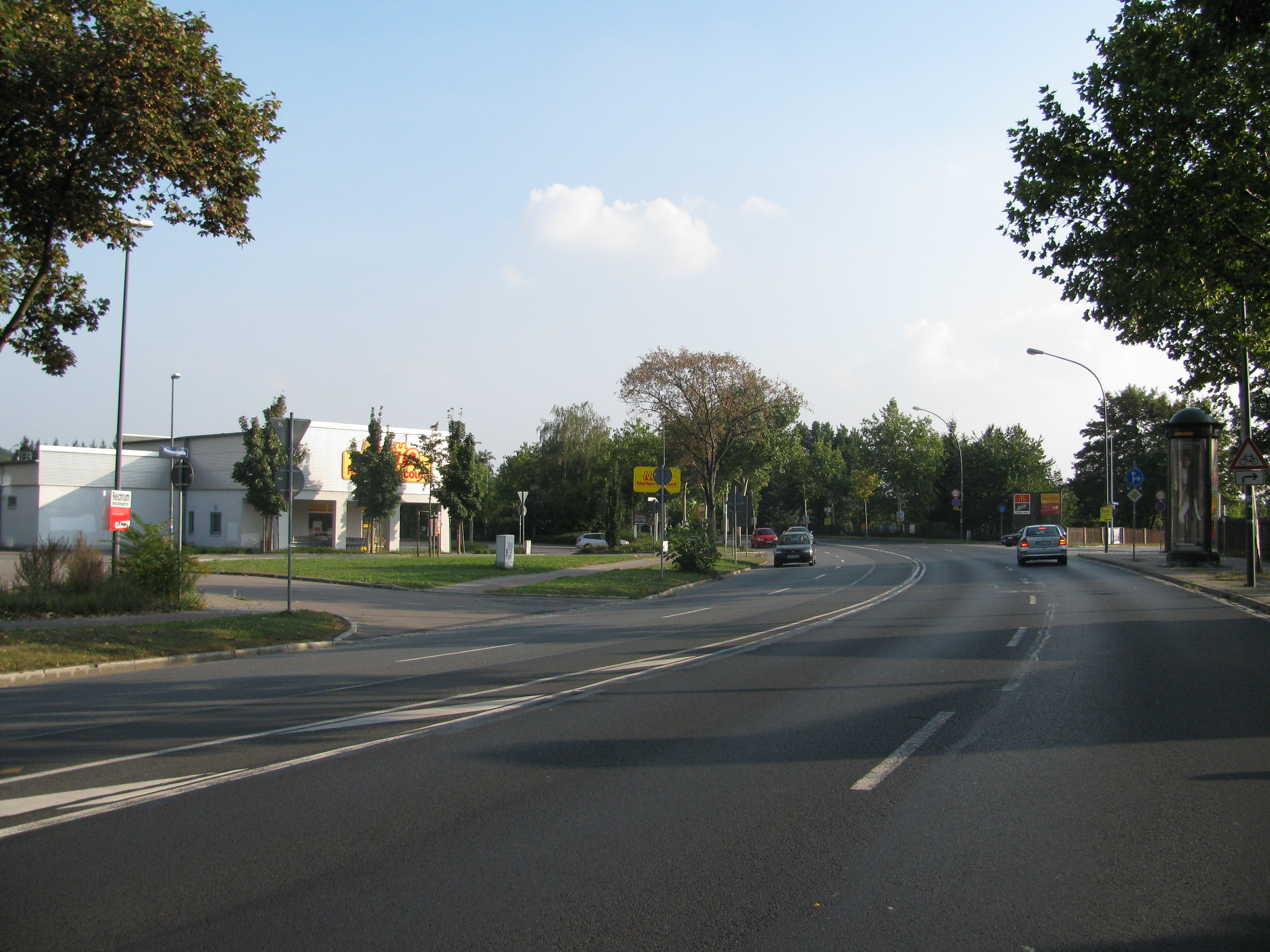 Hansastraße Dresden. In ihrem nördlichen Teilstück in Höhe Einmündung Weinböhlaer Straße (rechts) macht die Hansastraße eine langgezogene S-Kurve.